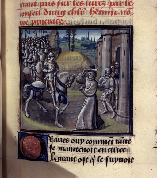 Godefroy de Bouillon accueilli en Cilicie